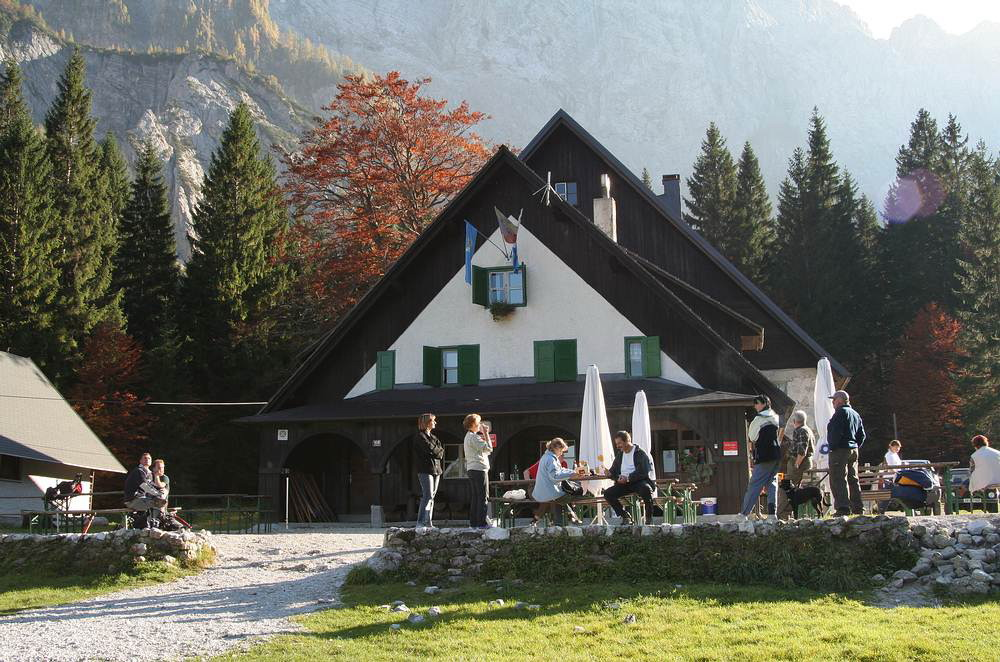 Dom v Tamarju (1108m)